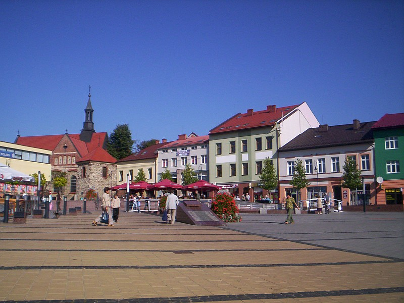 Market Square, Chrzanów, Poland.